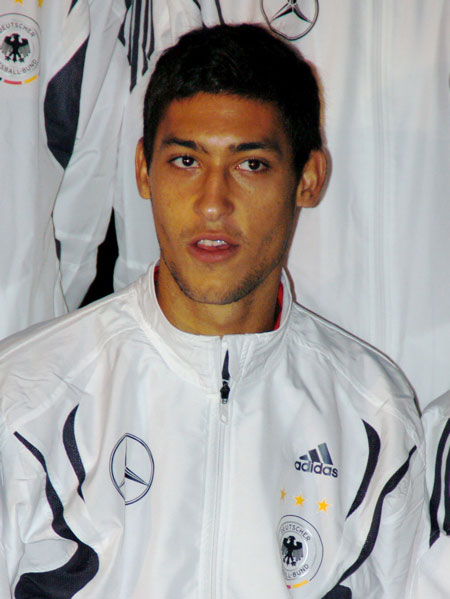 Malik Fathi, deutscher Fußball-Nationalspieler